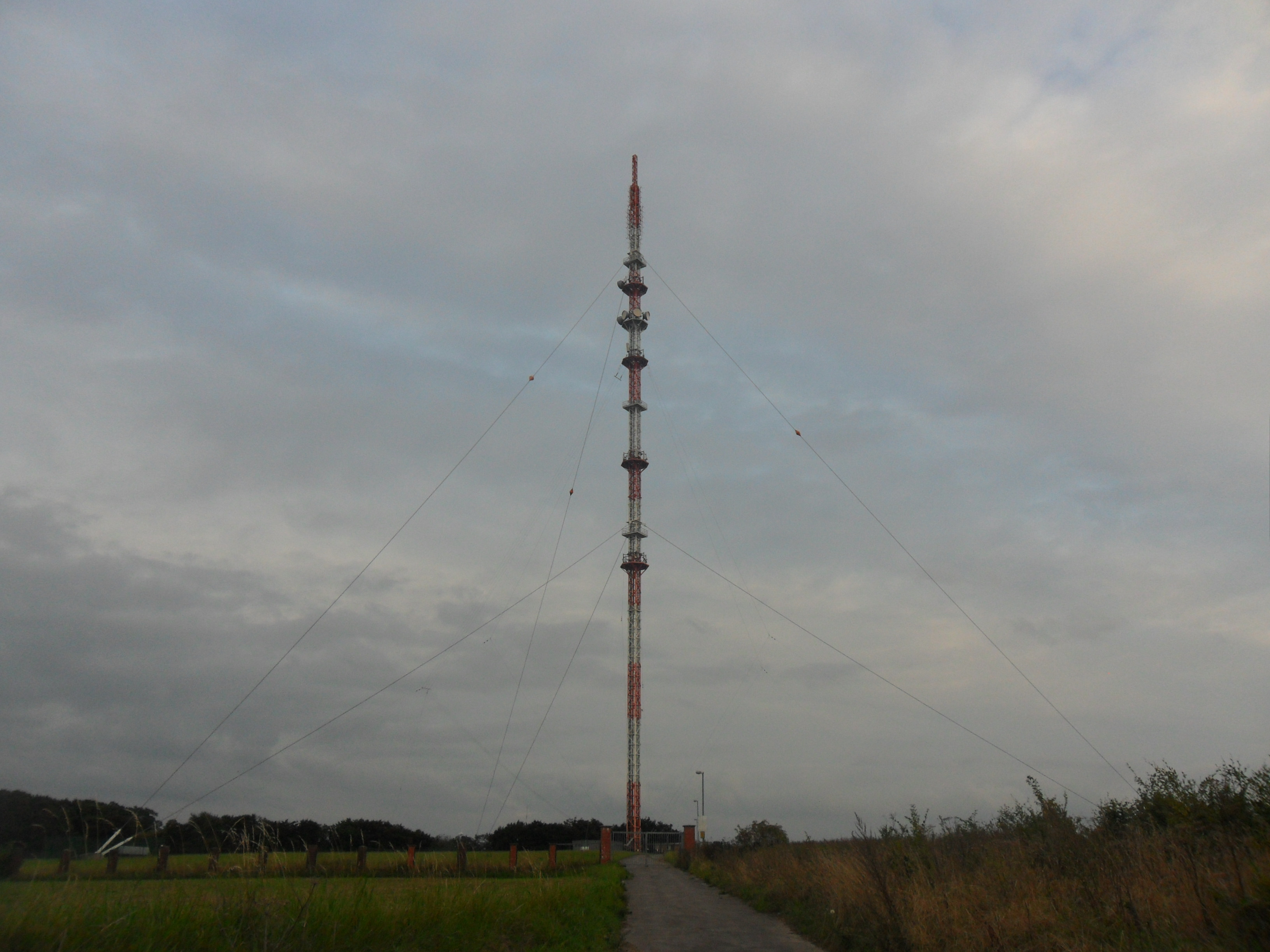 Zweiter, 170 Meter hoher Sendemast in Velbert-Langenberg, bei der Ortschaft Rommel